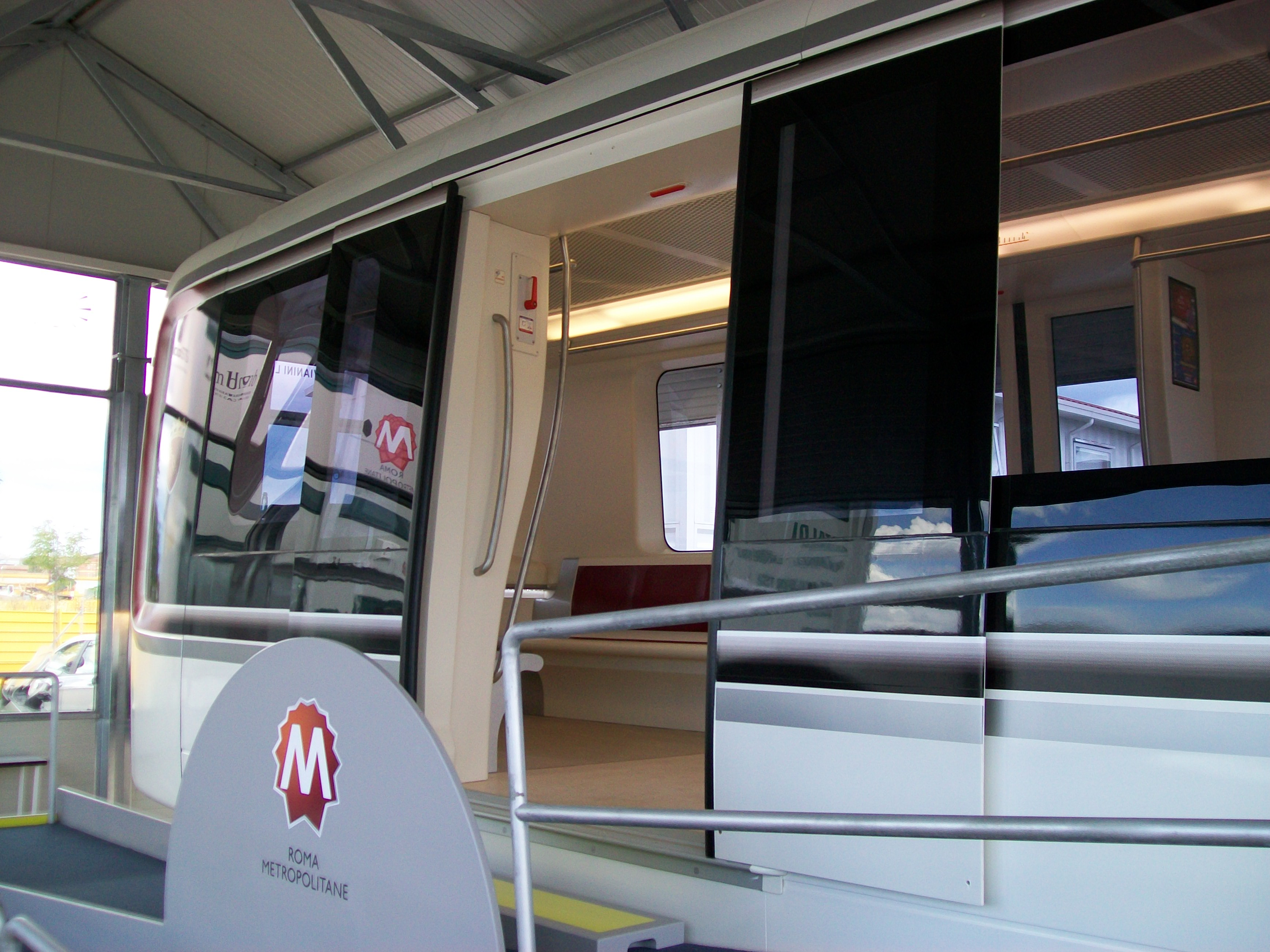 Il treno di profilo con le sue ampie vetrate. La forma della sezione del vagone è trapezoidale più tendente al quadrato. Il vagone espositivo si trova dentro una costruzione di vetro nei pressi del cantiere Teano-Quintiliani.